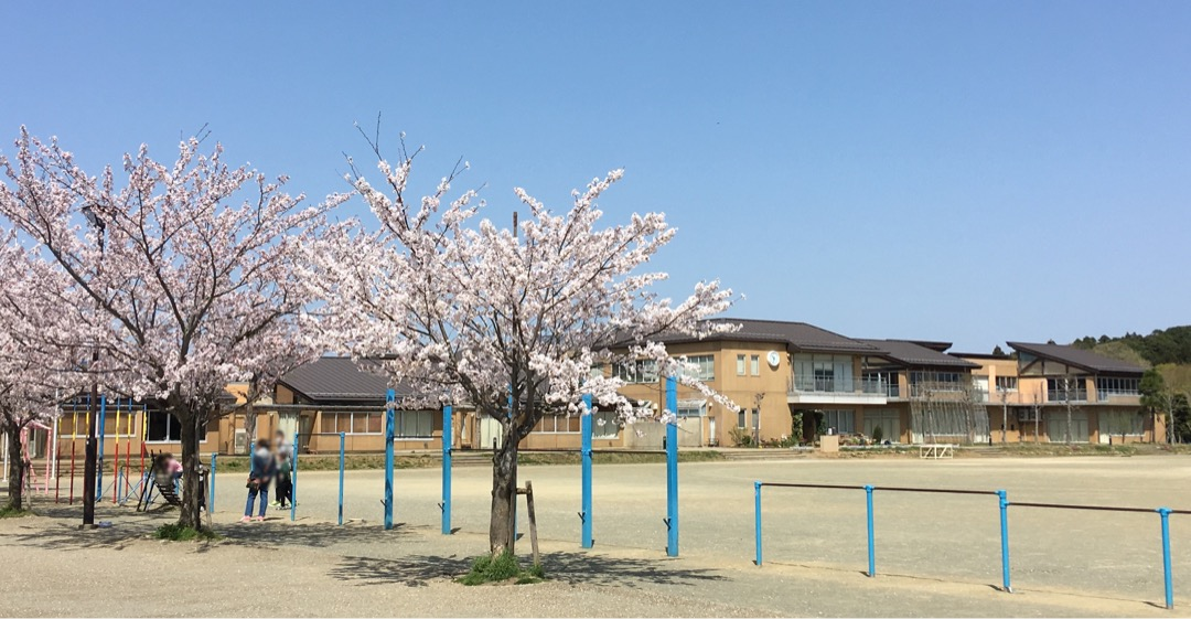 いには野小学校 全景